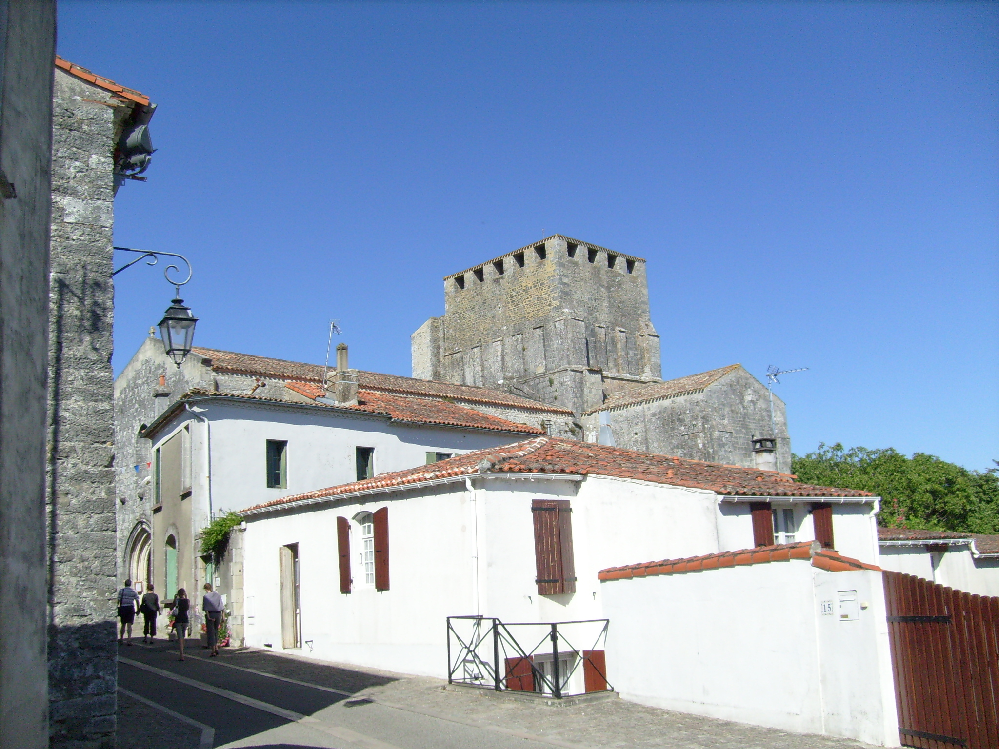 Mornac sur Seudre